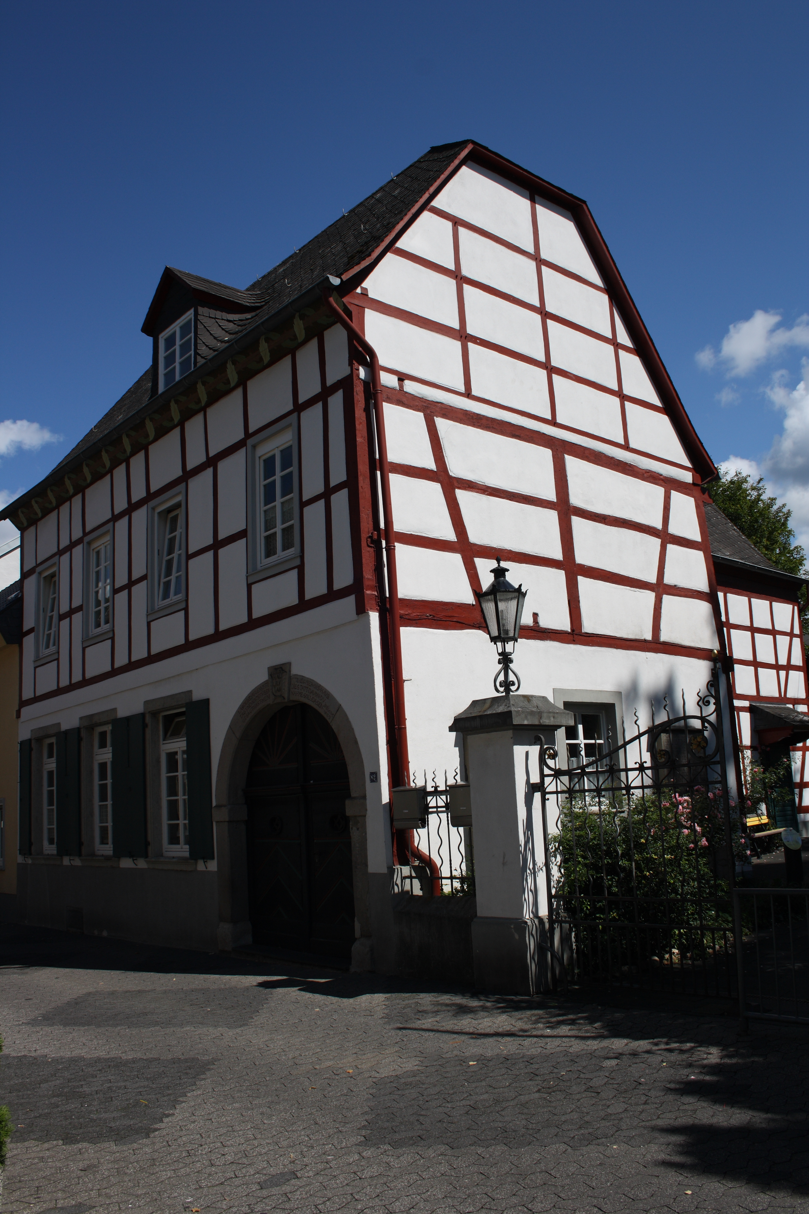 ehemaliges evangelisches Pfarrhaus in Oberwinter, Hauptstraße 82, bezeichnet 1715